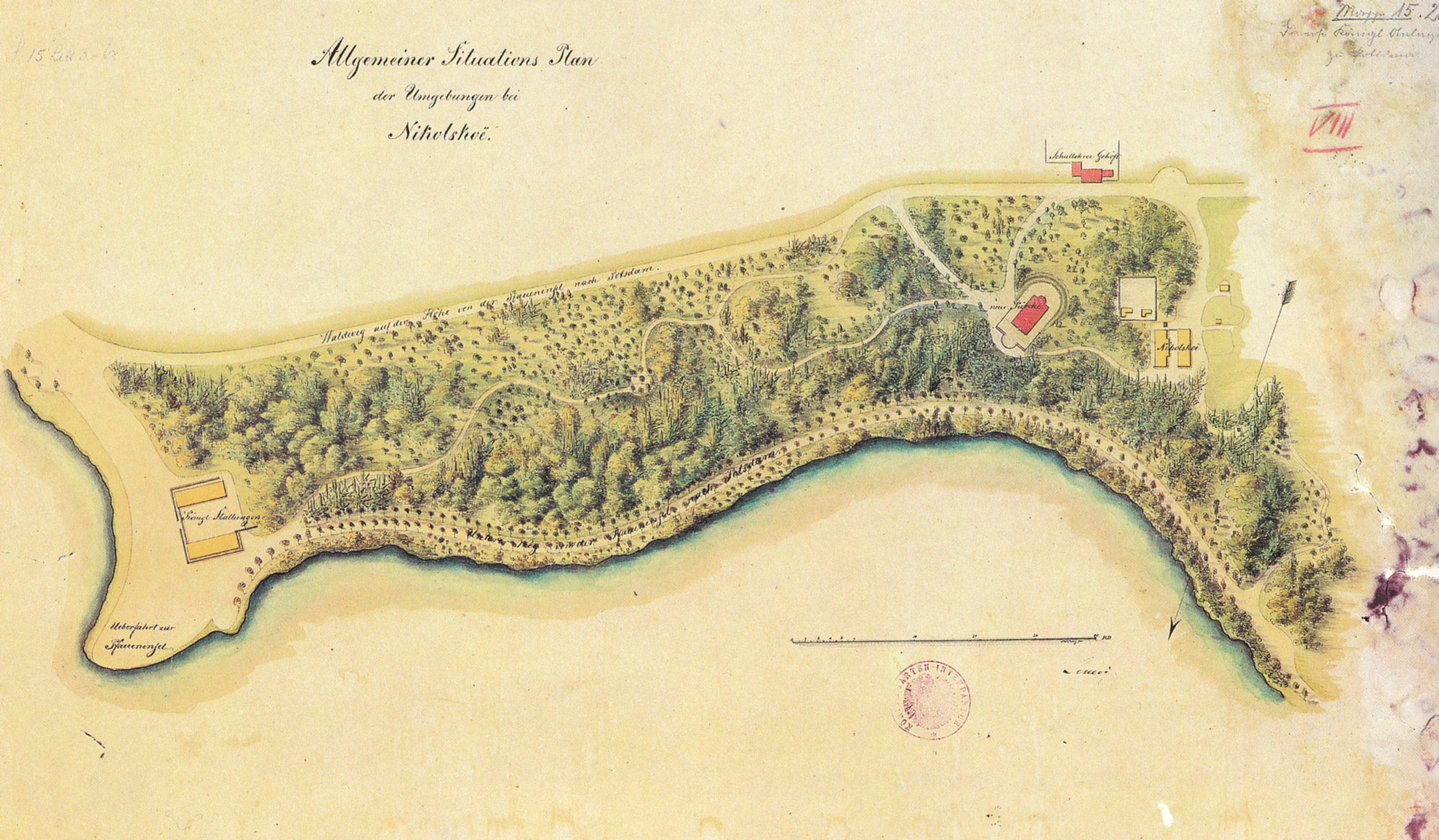 Lageplan Nikolskoe, Lenné 1837